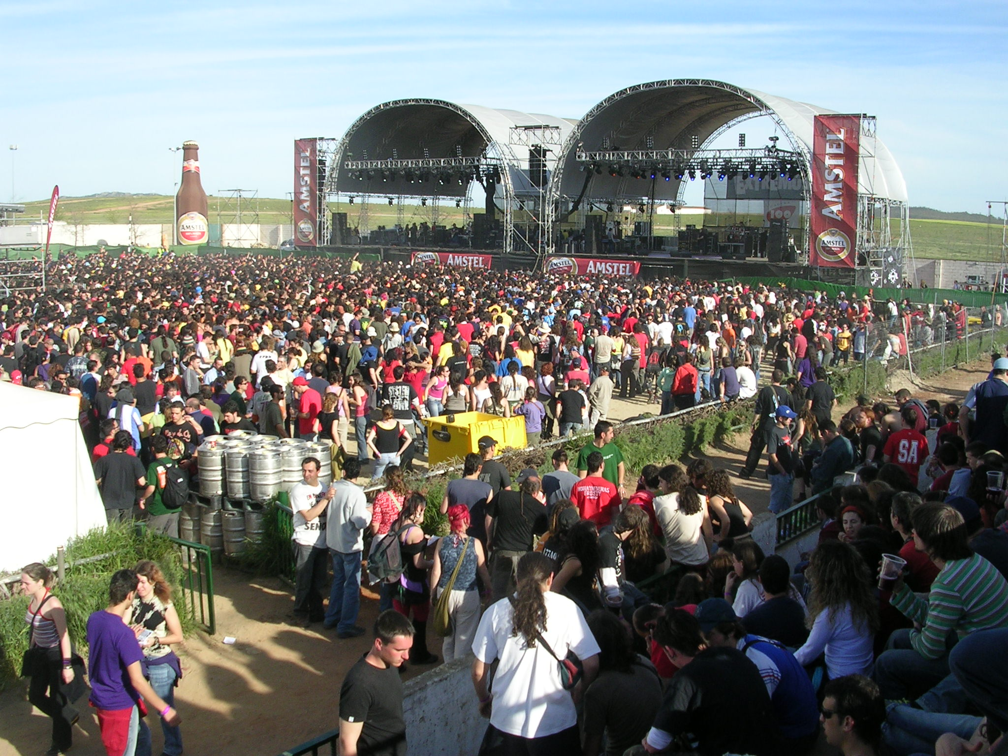 Escenarios del Extremúsika en la edición del 2006